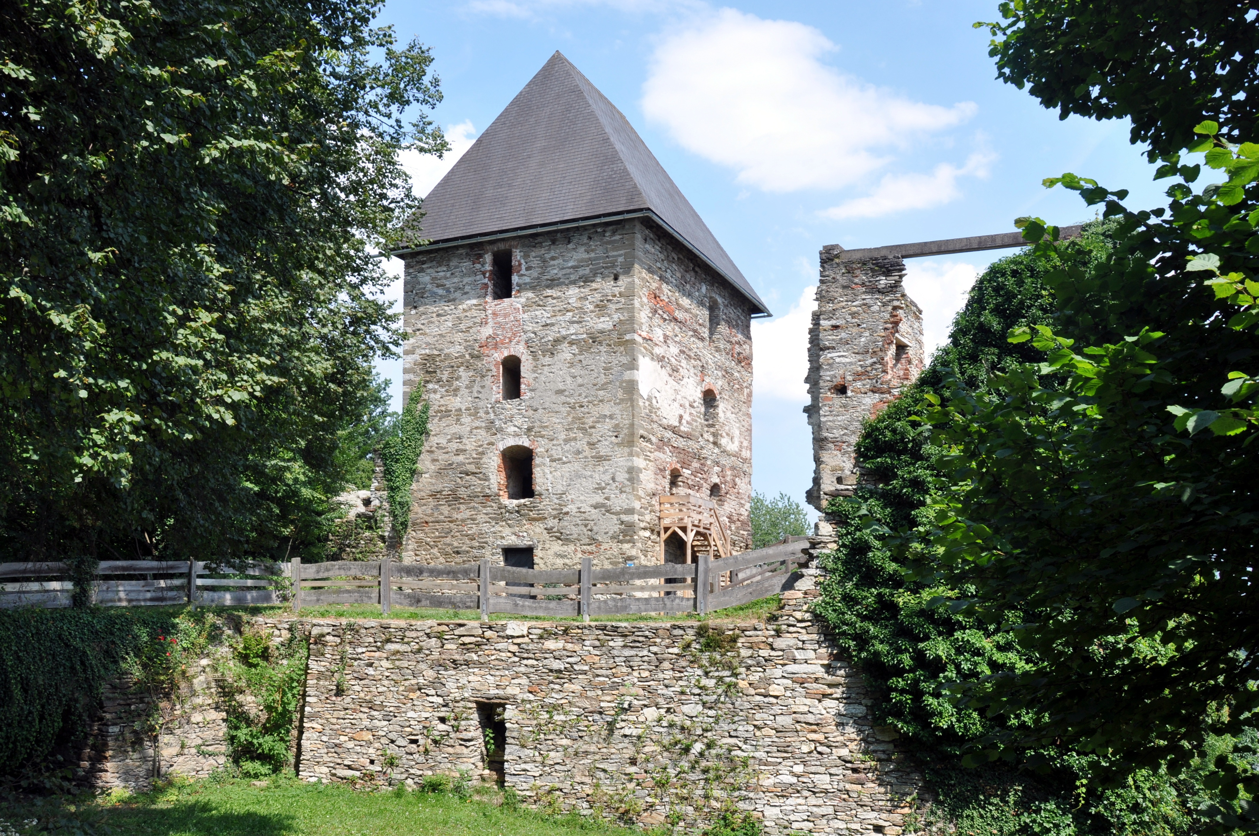 Bergfried der Burgruine Ligist (Altes Schloss, Veste Lubgast).